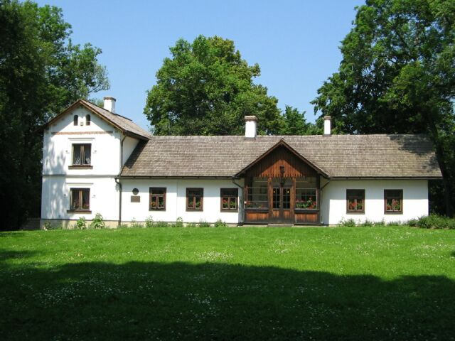 Muzeum Marii Konopnickiej w Żarnowcu